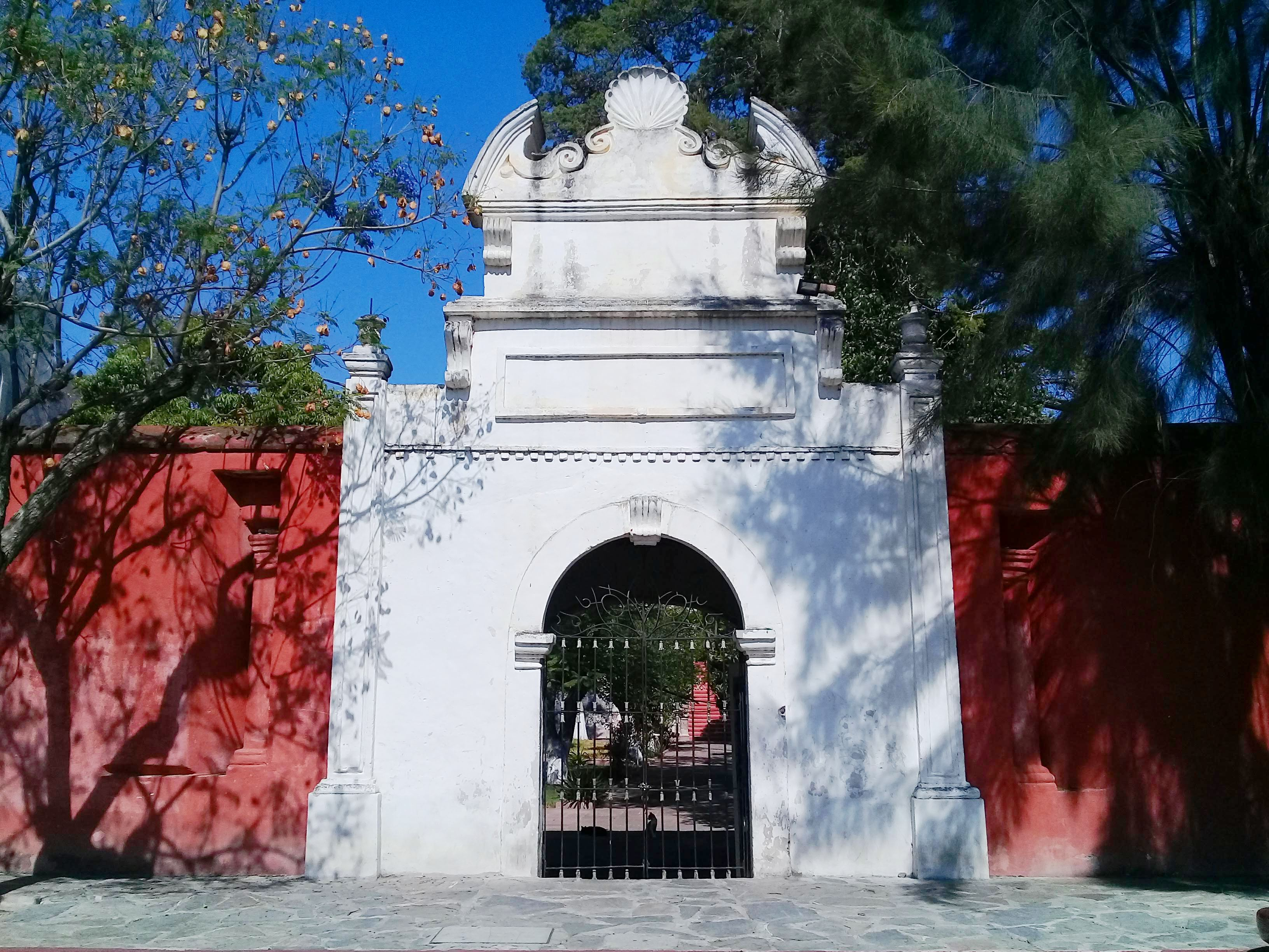 Templo y exconvento de San Nicolás de Tolentino en Actopan, Hidalgo, México.